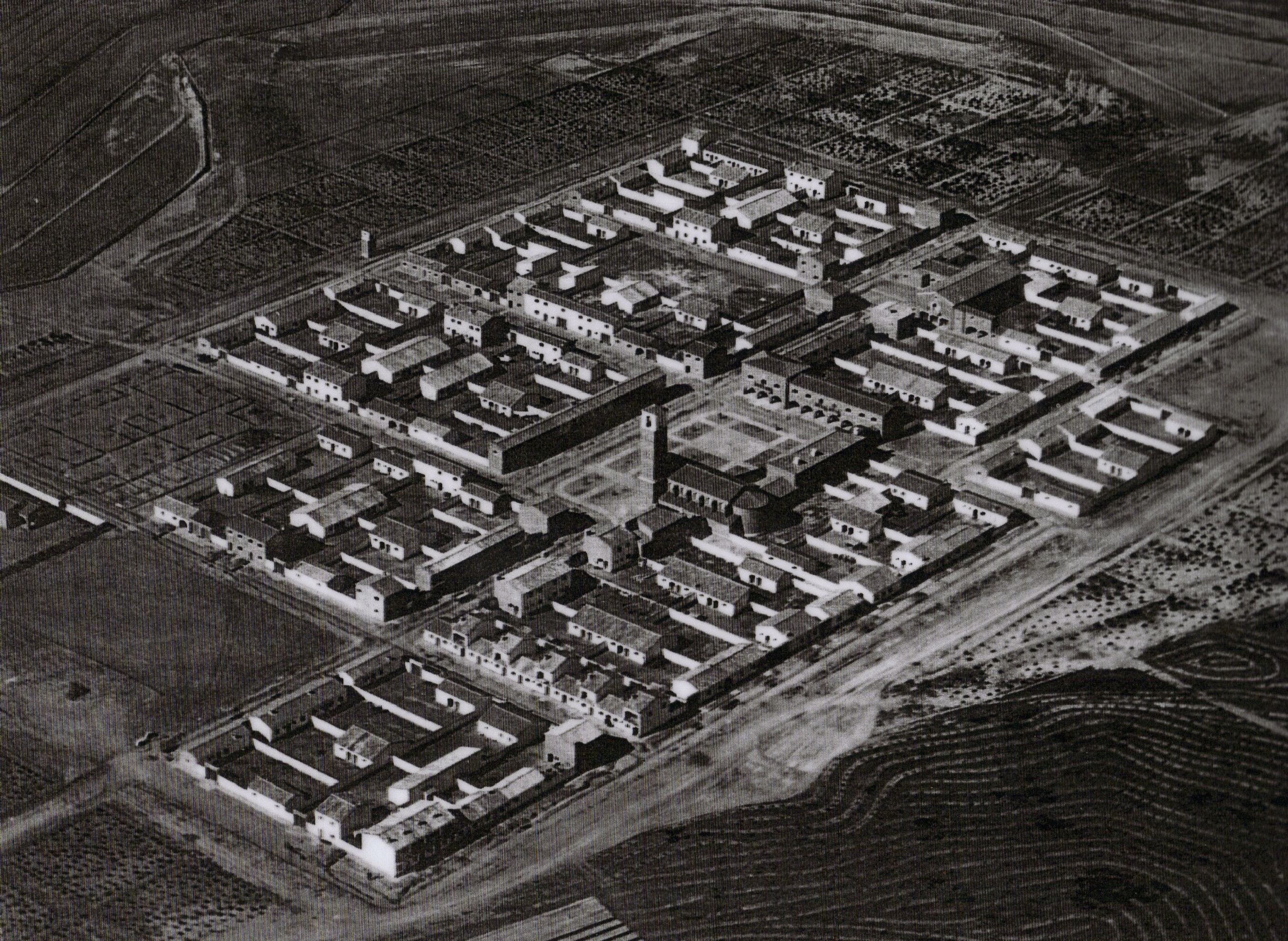 Foto de el pueblo de frula